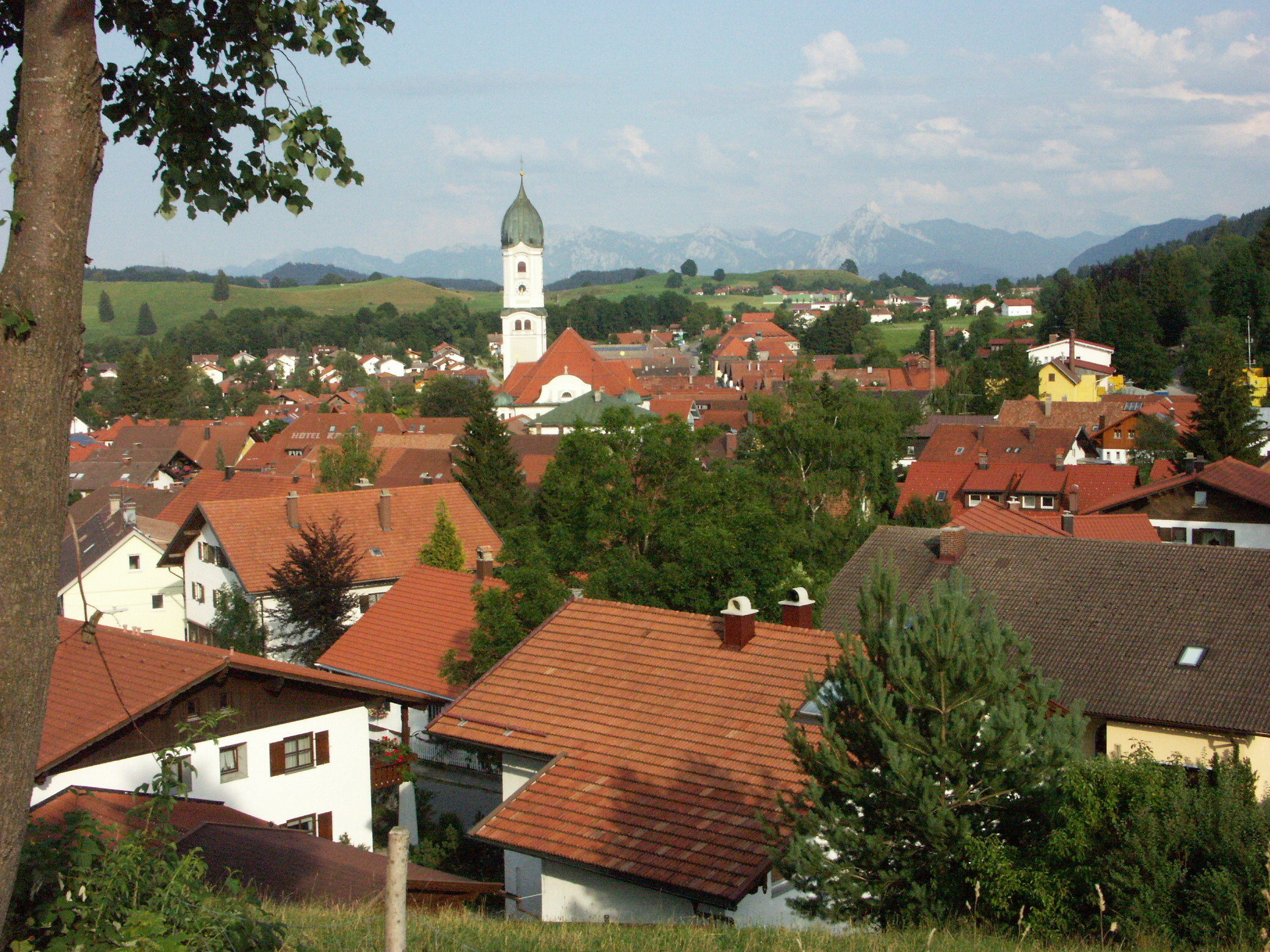 Ortsansicht Nesselwang